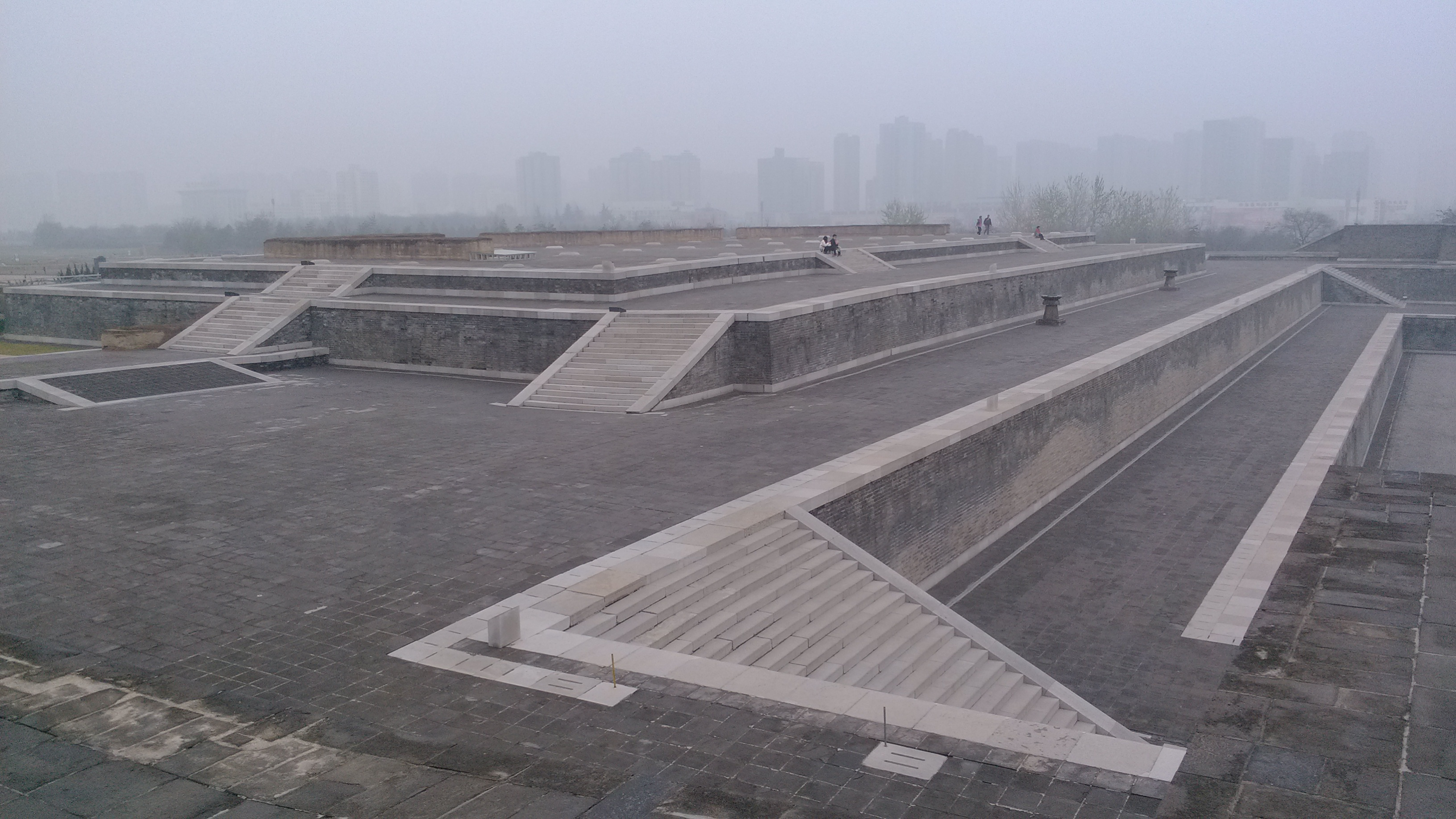 大明宫含元殿遗址